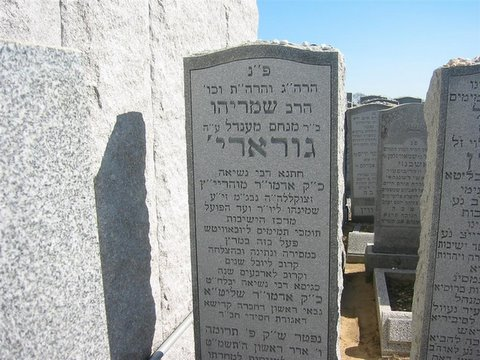 מצבת הרש"ג